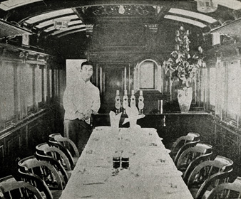 山陽鉄道の食堂車。明治時代。